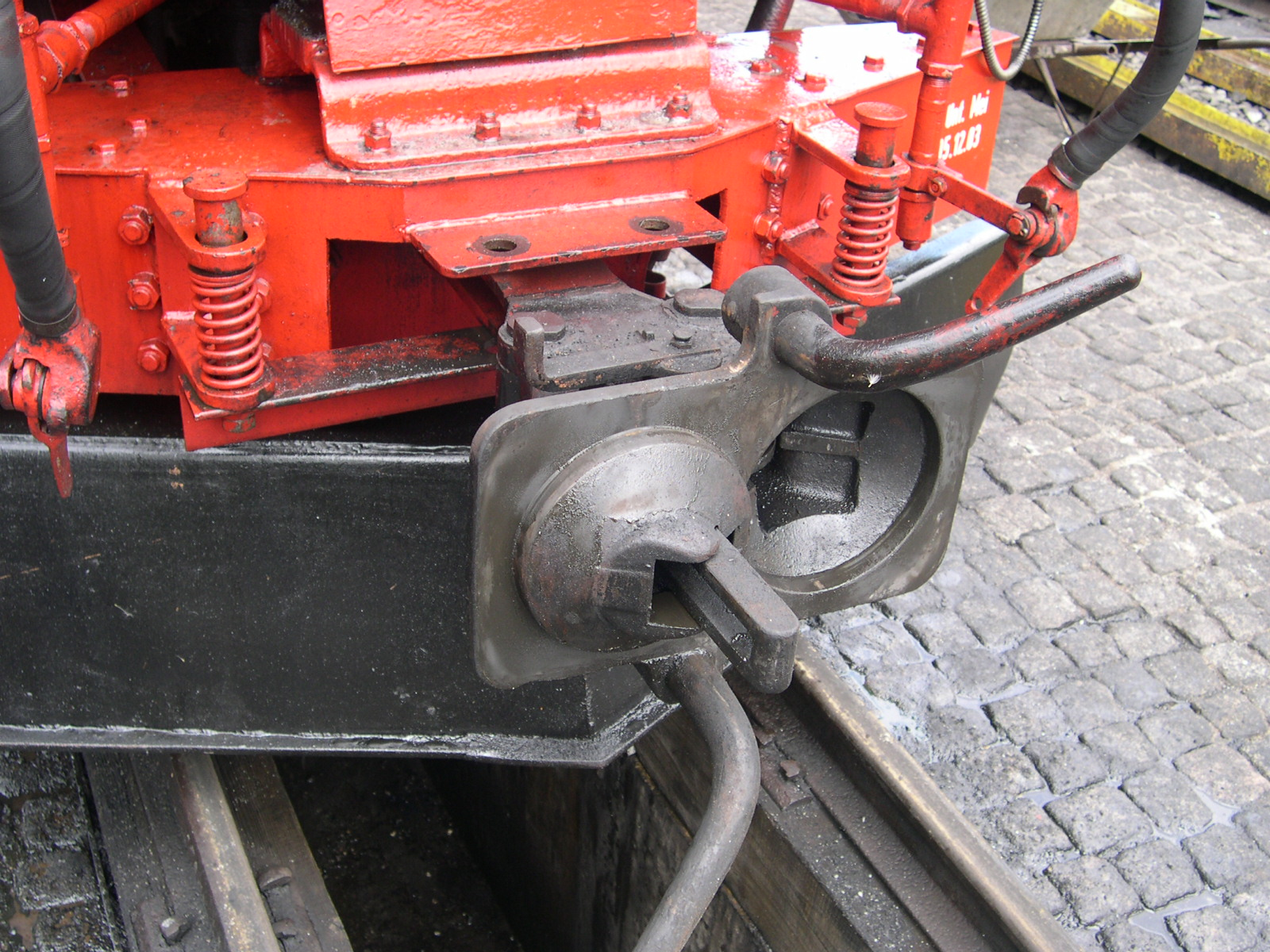 Kupplungskopf der Scharfenbergkupplung die bei den Schmalspurbahnen in Sachsen angewandt werden, hier an der Dampflok 99 1590 der Pressnitztalbahn in Joehstadt.